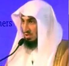 فهد بن عبد الرحمن اليحيى